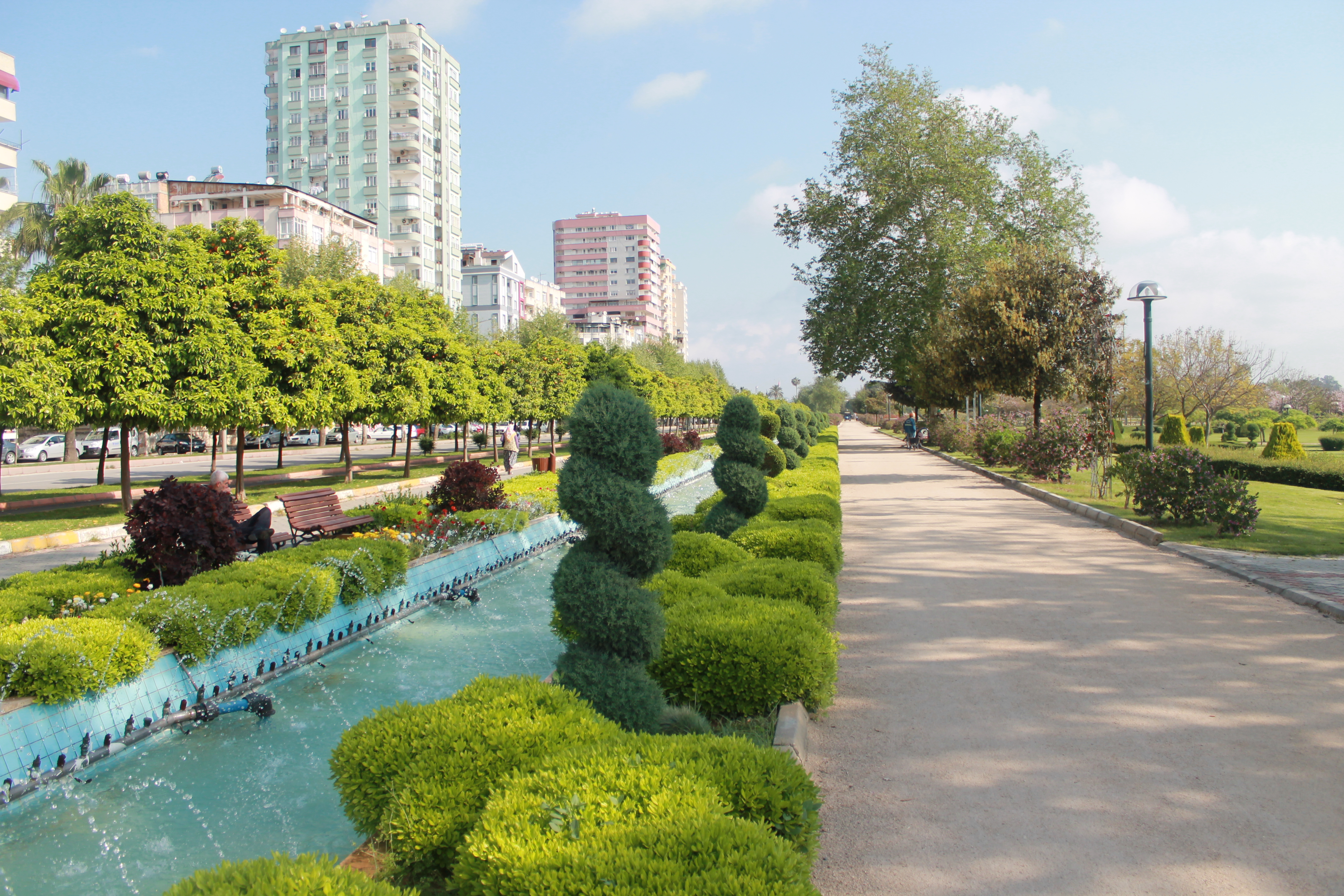 Adana, Reşatbey Mh., Seyhan/Adana, Turkey